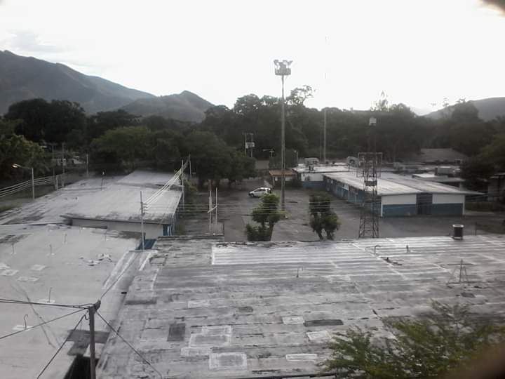 Foto tomada desde el edificio de la Facultad de ingeniería de la Universidad de Carabobo